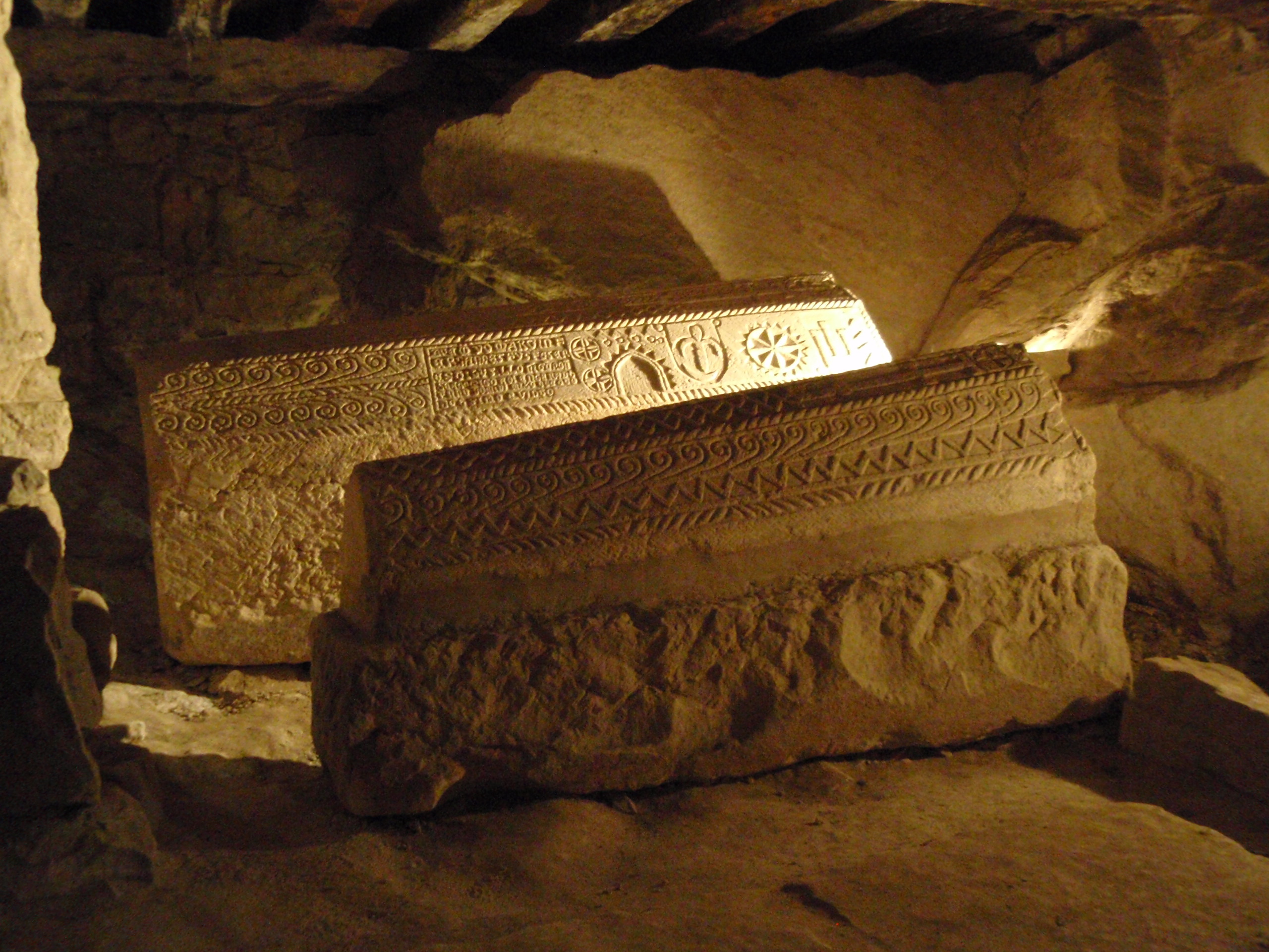 Sarcófagos de Caballero de la Orden de San Juán de Jerusalén